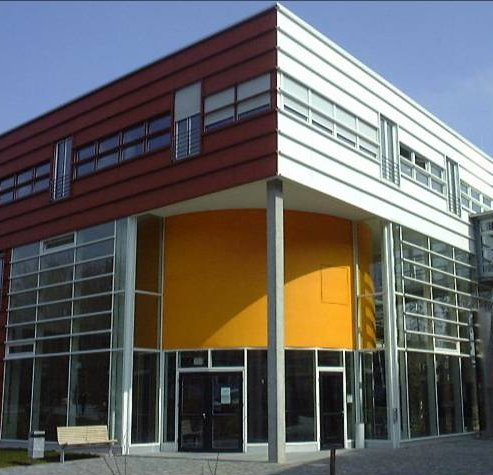 Bibliotheks-Zentrale des Kommunikations- und Informationszentrums der Universität Ulm am Campus West.